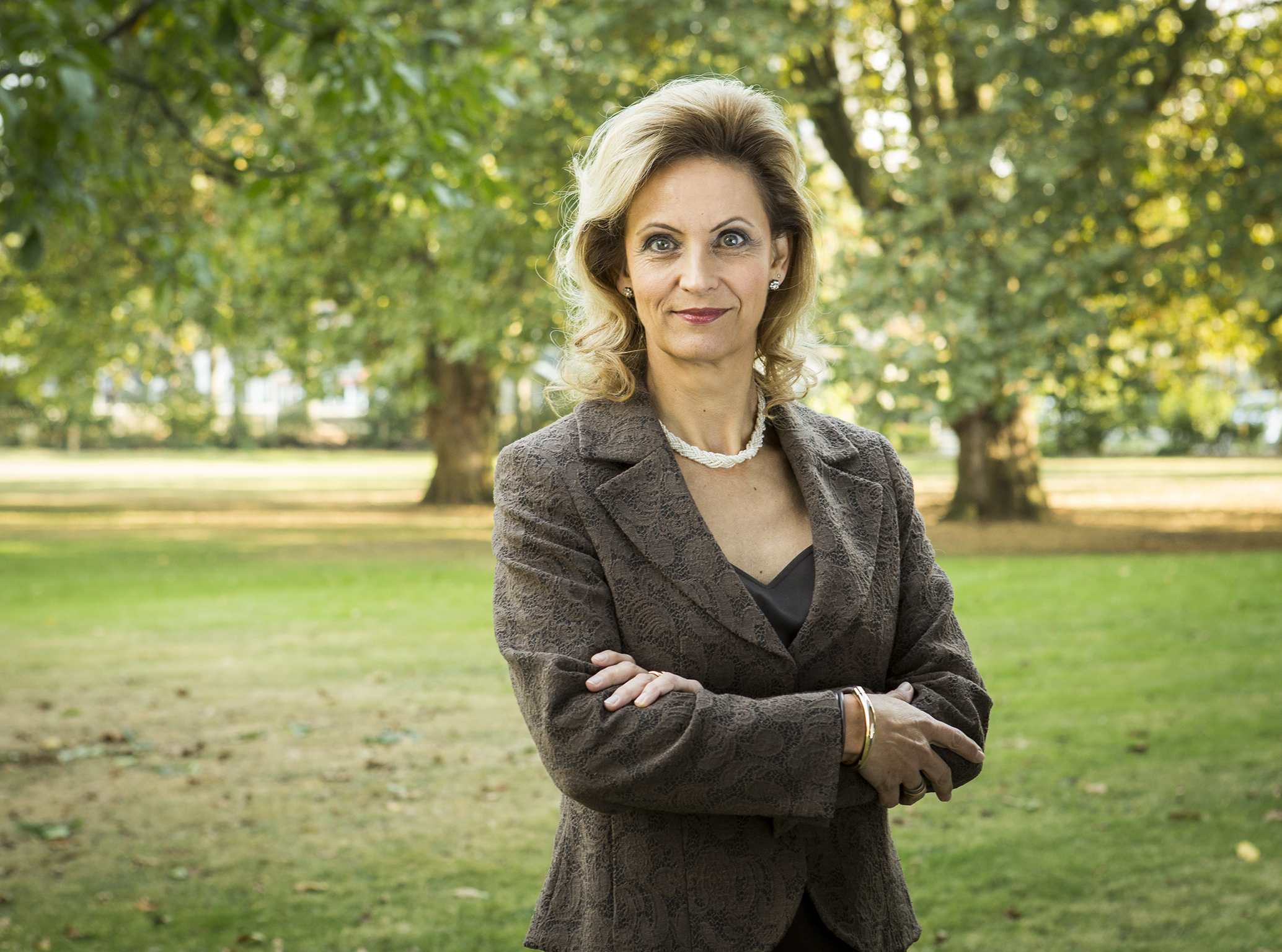 Ulrike Lubek, 2016